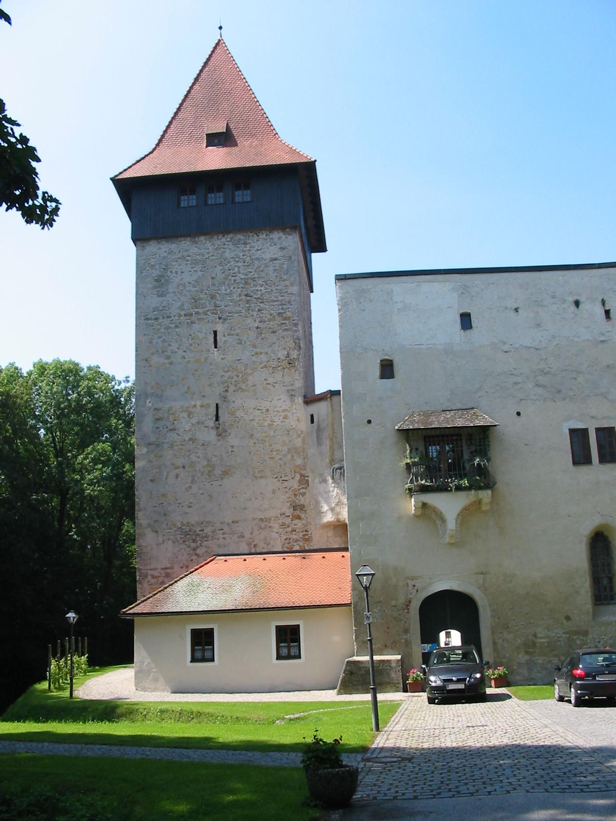 Haupteingang von Schloss Ulmerfeld mit Bergfried